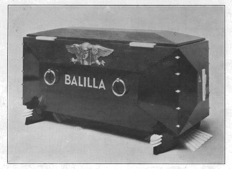 Cofano porta bandiera di combattimento del sommergibile Balilla, realizzato nel 1930 dall'architetto Enrico Del Debbio